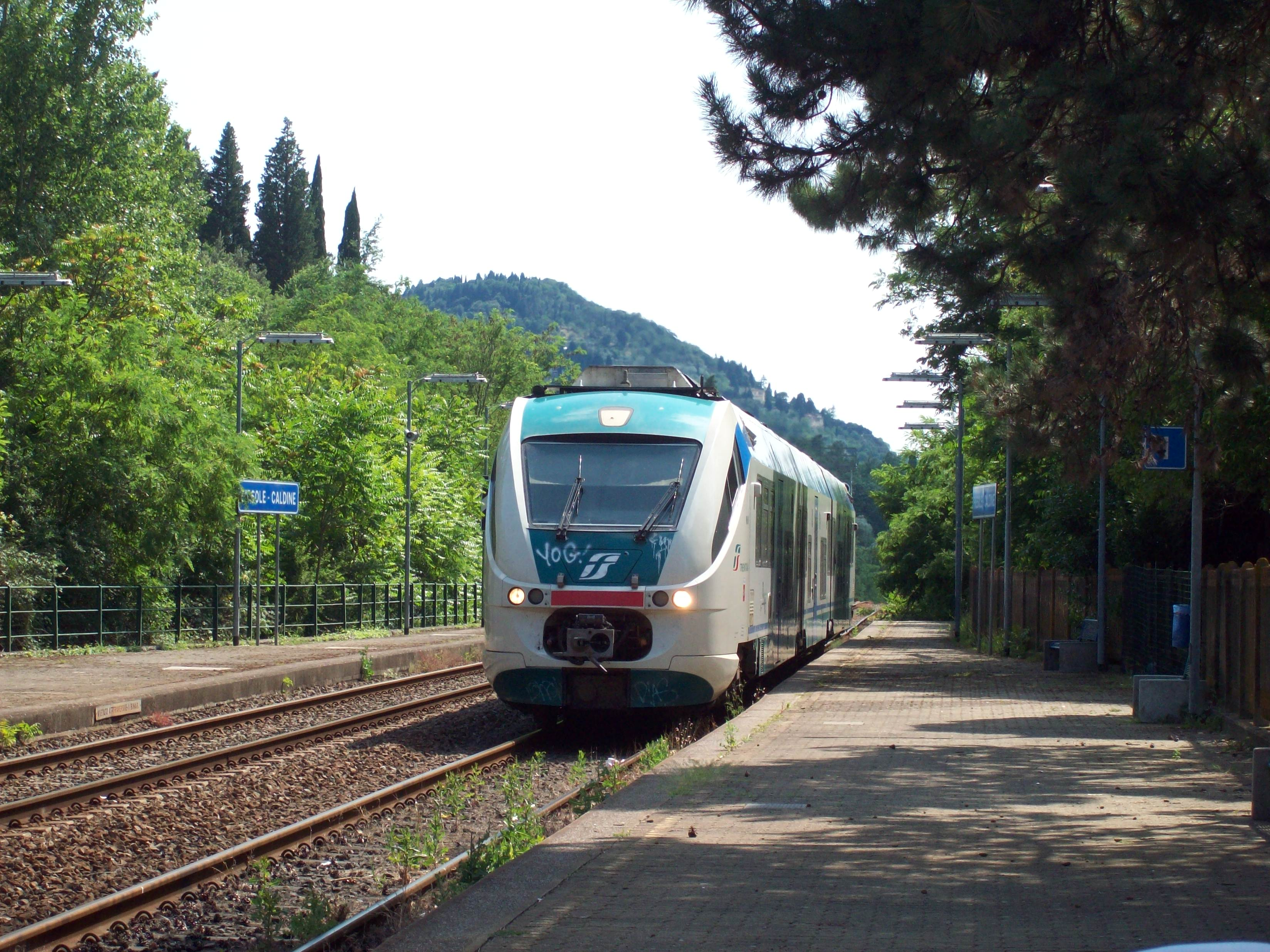 Un Minuetto diesel in arrivo alla stazione di Fiesole-Caldine, sulla ferrovia faentina